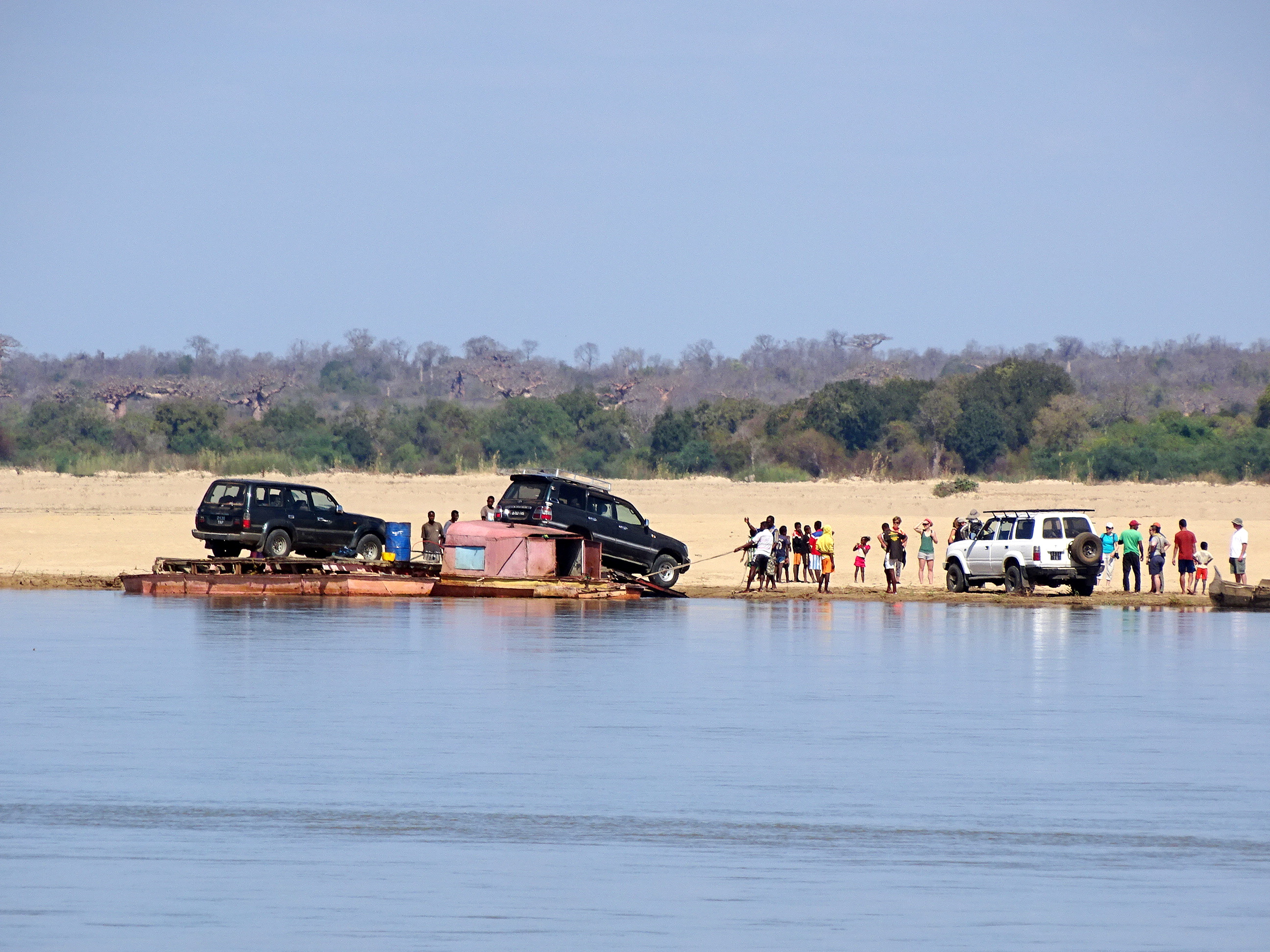 Ces voitures viennent de traverser le fleuve Mangoky au moyen d'un bac, à Madagascar This is an image with the theme "Africa on the Move or Transport" from: Madagascar